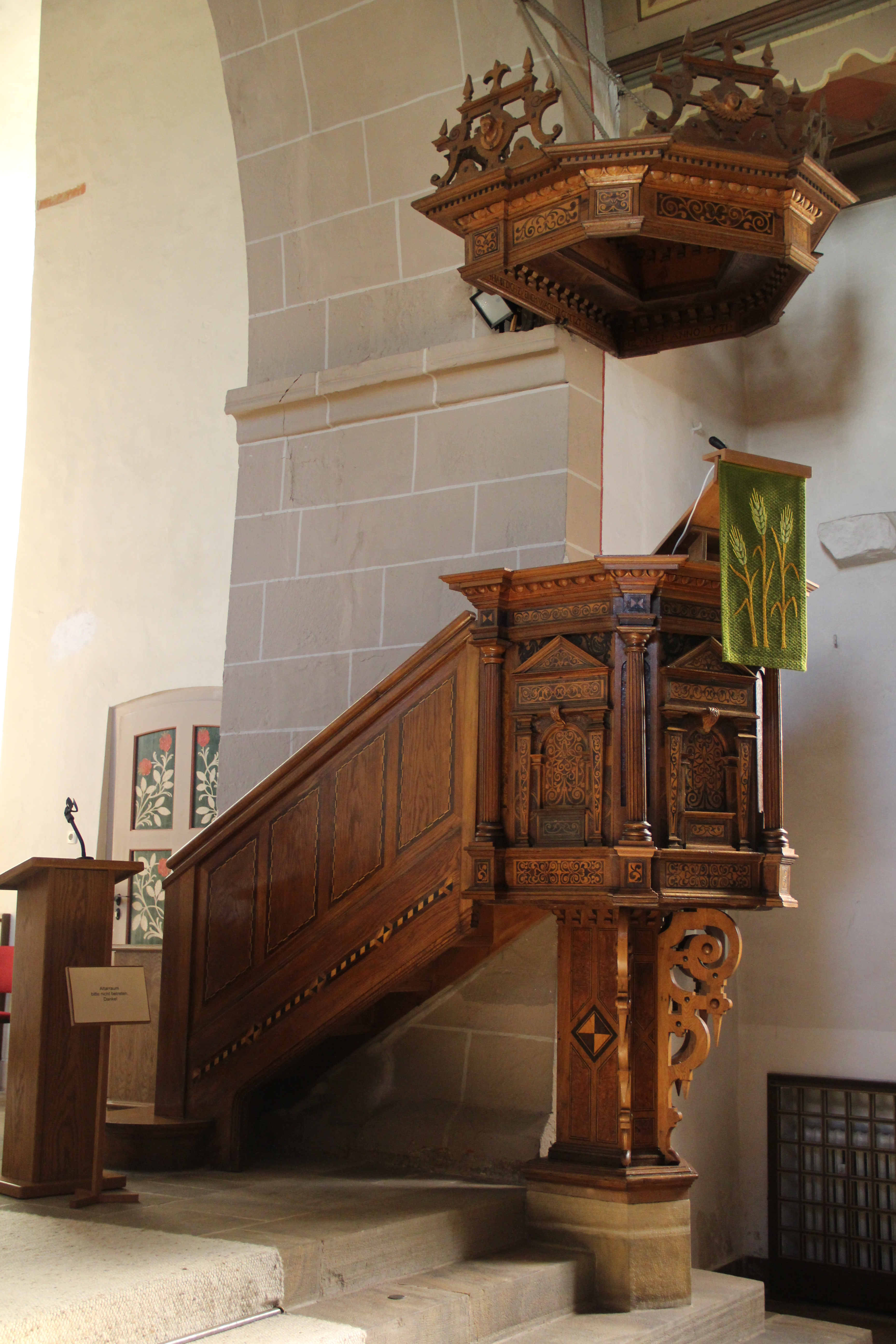 Martinskirche (Dautphe)